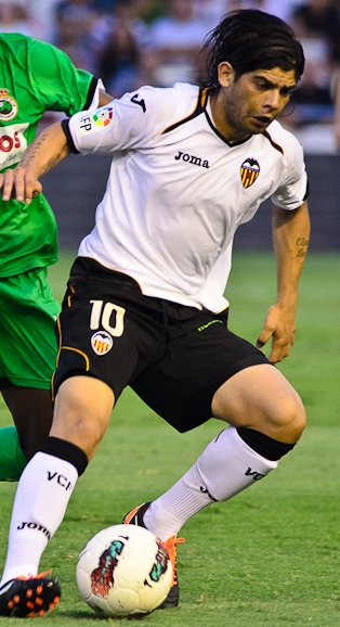 El jugador merengot Ever Banega fa un regat